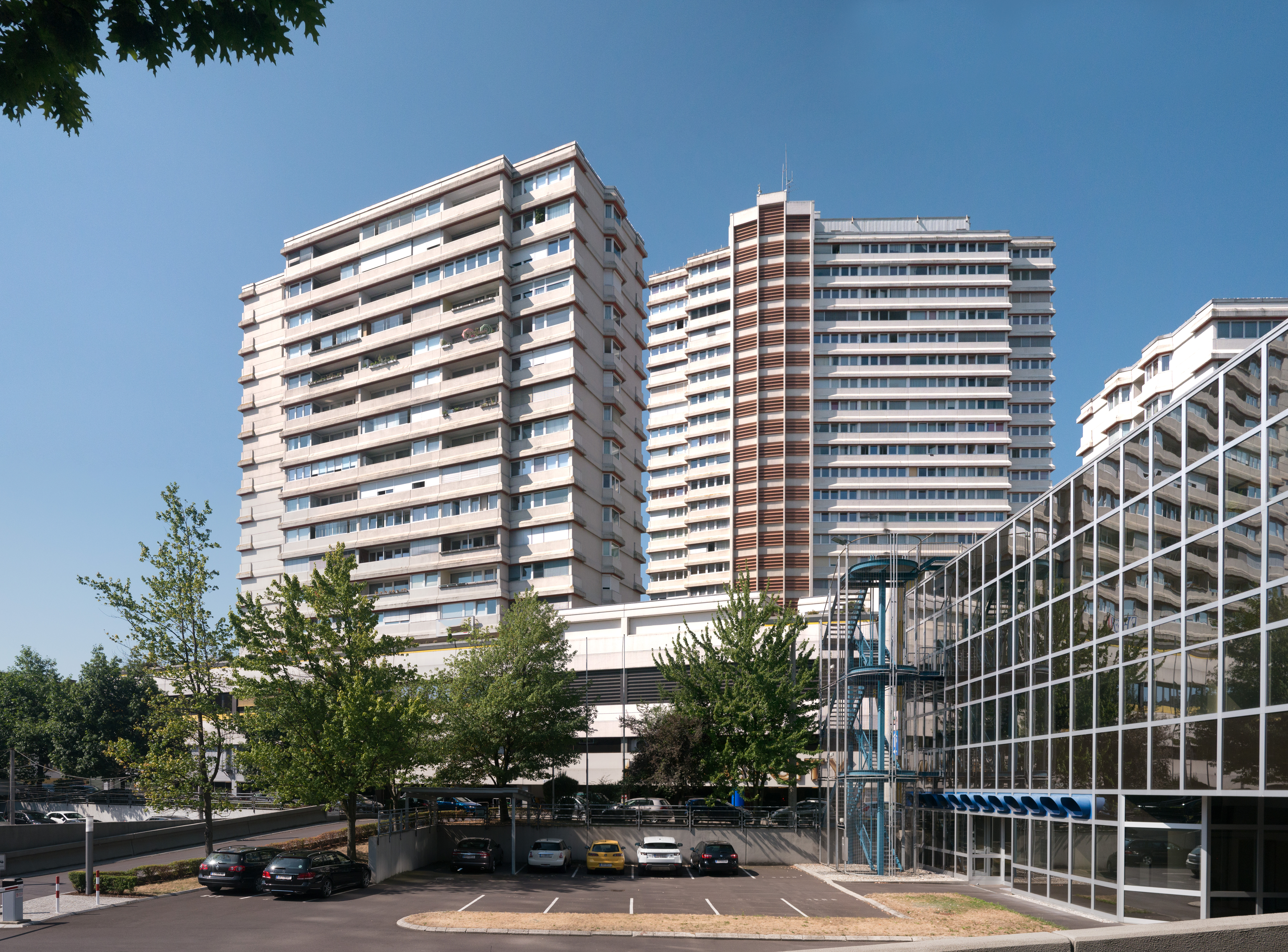 Lentia 2000 Ostansicht (kein kurviges stitch, sondern ein knick im gebäude)